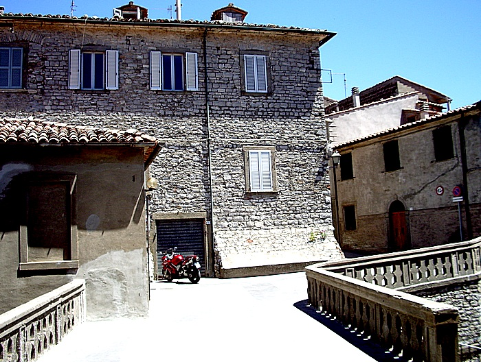 Scorcio con il palazzo della Rocca aldobrandesca di Castell'Azzara (GR), Tuscany (Italy)